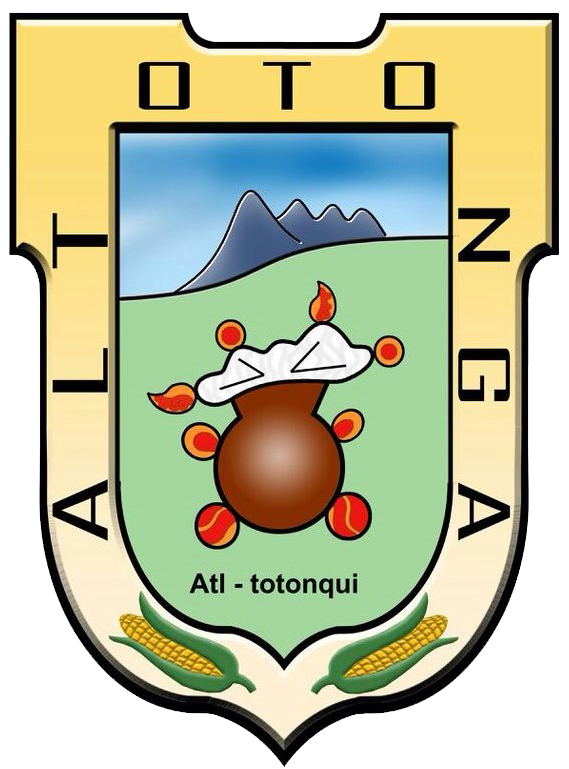 Oficial